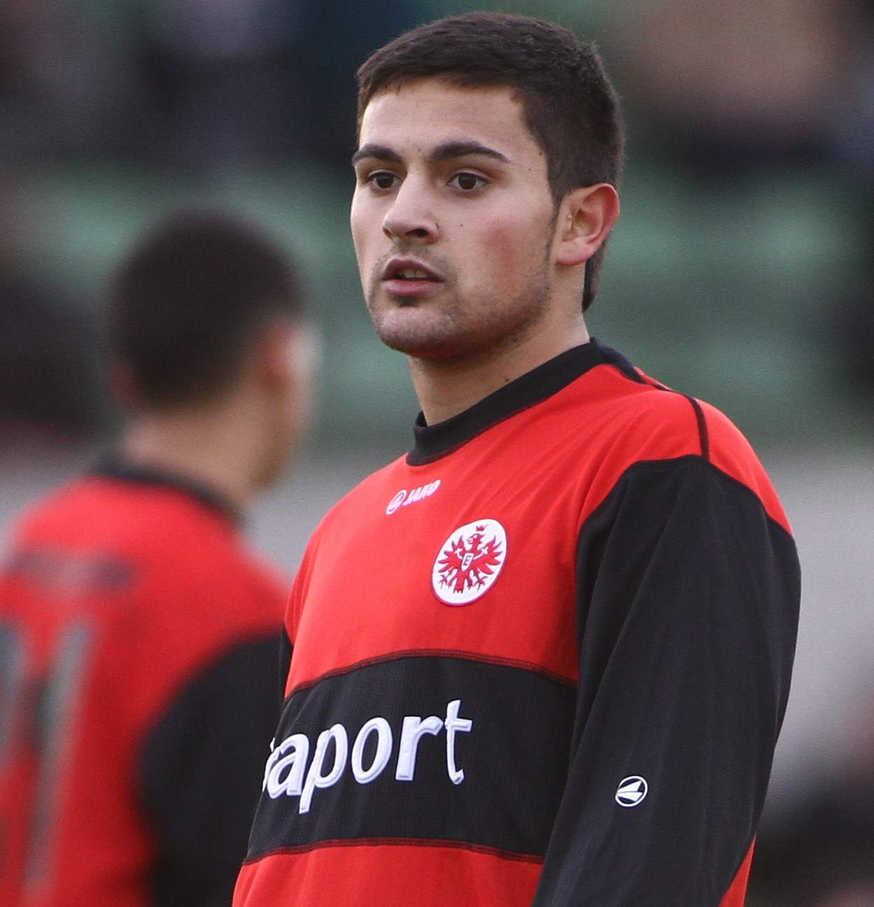 Marcos Alvarez bei Eintracht Frankfurt 2009